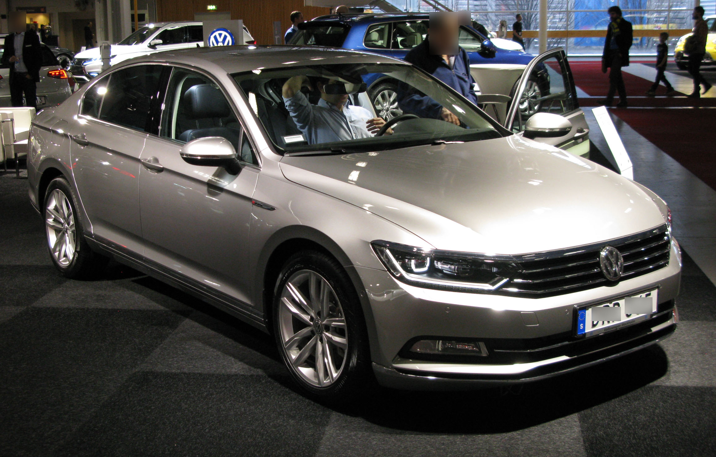 Volkswagen Passat B8